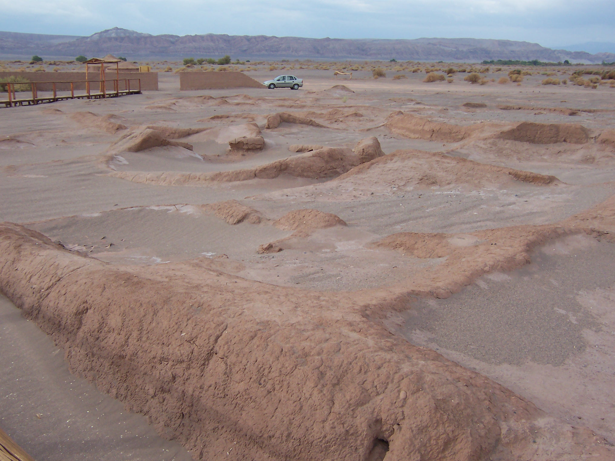 Aldea Tulor -Actualidad 2007